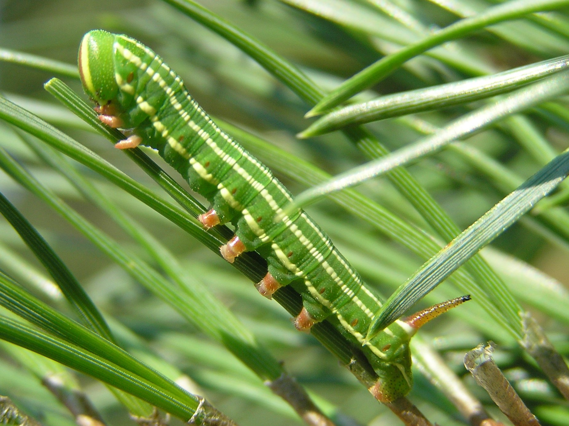 Sphinx pinastri, larva, Brok, Polska